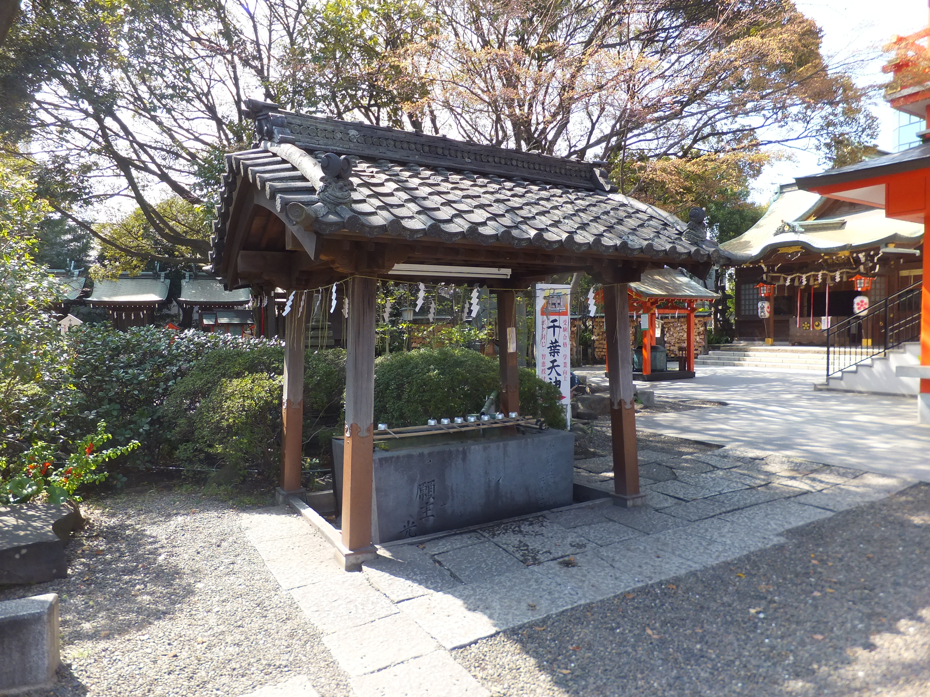 千葉神社手水社